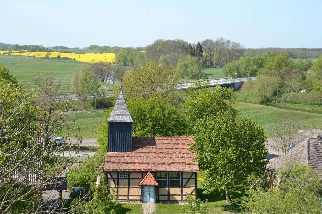 Dorfkirche in Klempenow (Mecklenburg-Vorpommern)